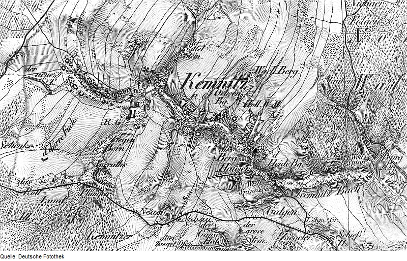 Original image description from the Deutsche Fotothek Bernstadt auf dem Eigen-Kemnitz. Oberreit, Sect. Zittau, 1844/46